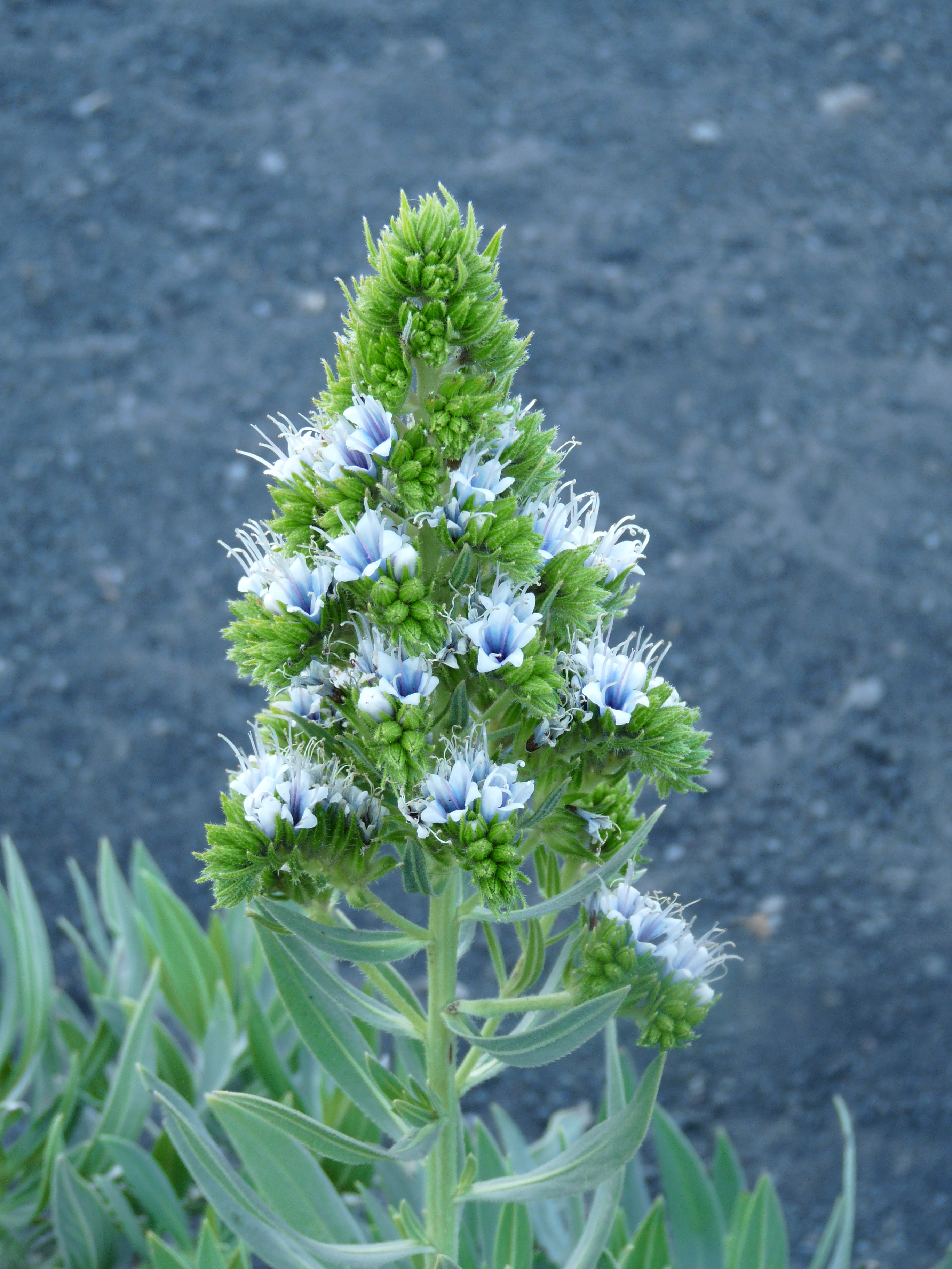 Chã das Caldeiras : Echium vulcanorum (Lingua-de-Vaca), espèce endémique de l'île de Fogo (Cap-Vert)